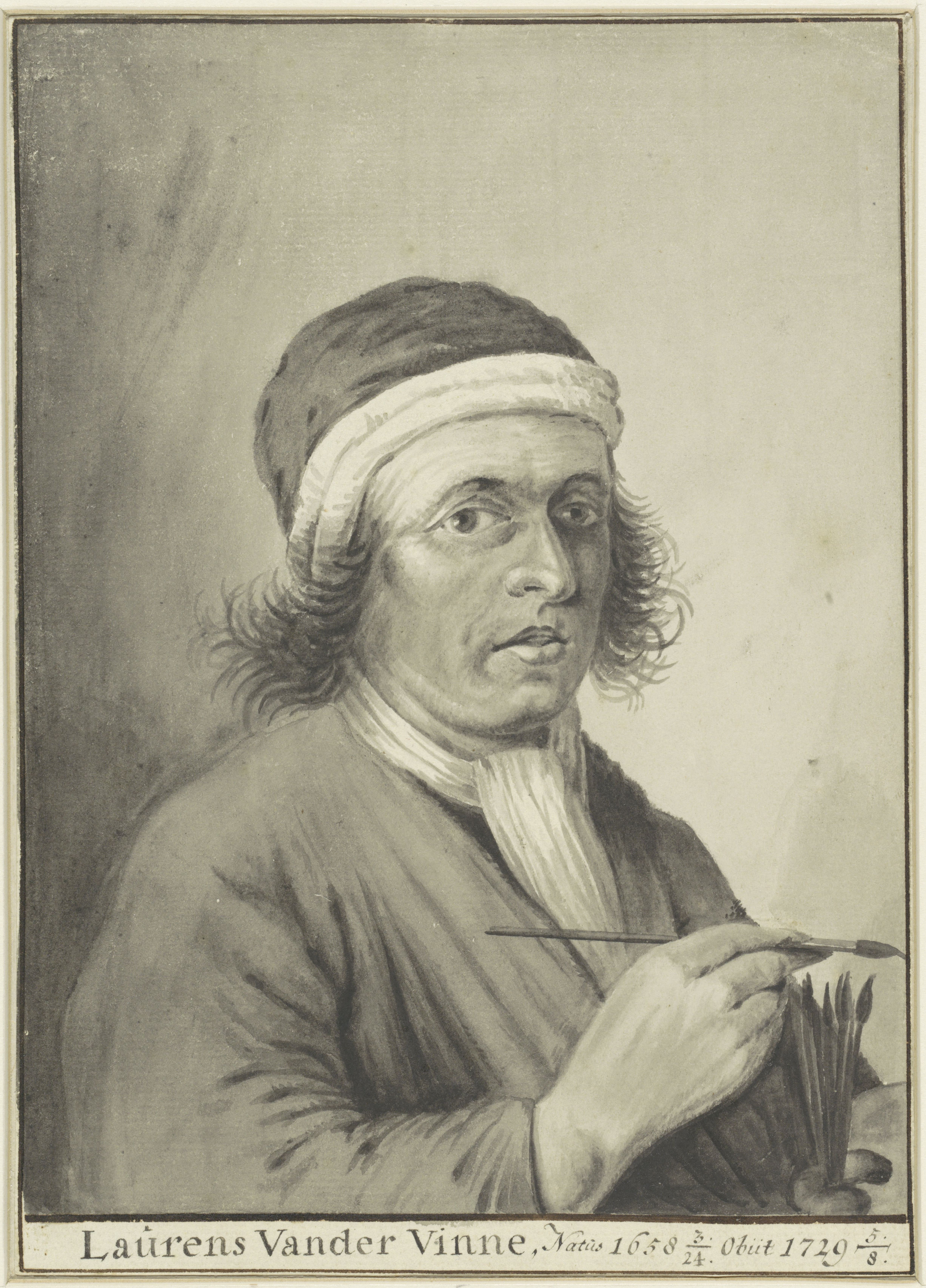 IdentificatieTitel(s): Portret van de schilder Laurens Vincentsz. van der VinneObjecttype: tekening Objectnummer: RP-T-00-2734XVervaardigingVervaardiger: naar tekening van: Laurens Vincentsz. van der Vinnetekenaar: anoniemDatering: ca. 1668 - ca. 1779Fysieke kenmerken: penseel in zwart en grijsMateriaal: papier Techniek: penseelAfmetingen: h 227 mm × b 162 mmToelichtingKopie naar zelfportret van de schilder Laurens Vincentsz. van der Vinne.OnderwerpWat: portrait, self-portrait of artistportrait, self-portrait of painterhistorical person (VINNE, Laurens Vincentsz. van der) - historical person (VINNE, Laurens Vincentsz. van der) portrayed aloneWie: Laurens Vincentsz. van der VinneVerwerving en rechtenVerwerving: onbekendCopyright: Publiek domein